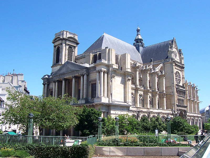 Parigi - Chiesa di St. Eustache